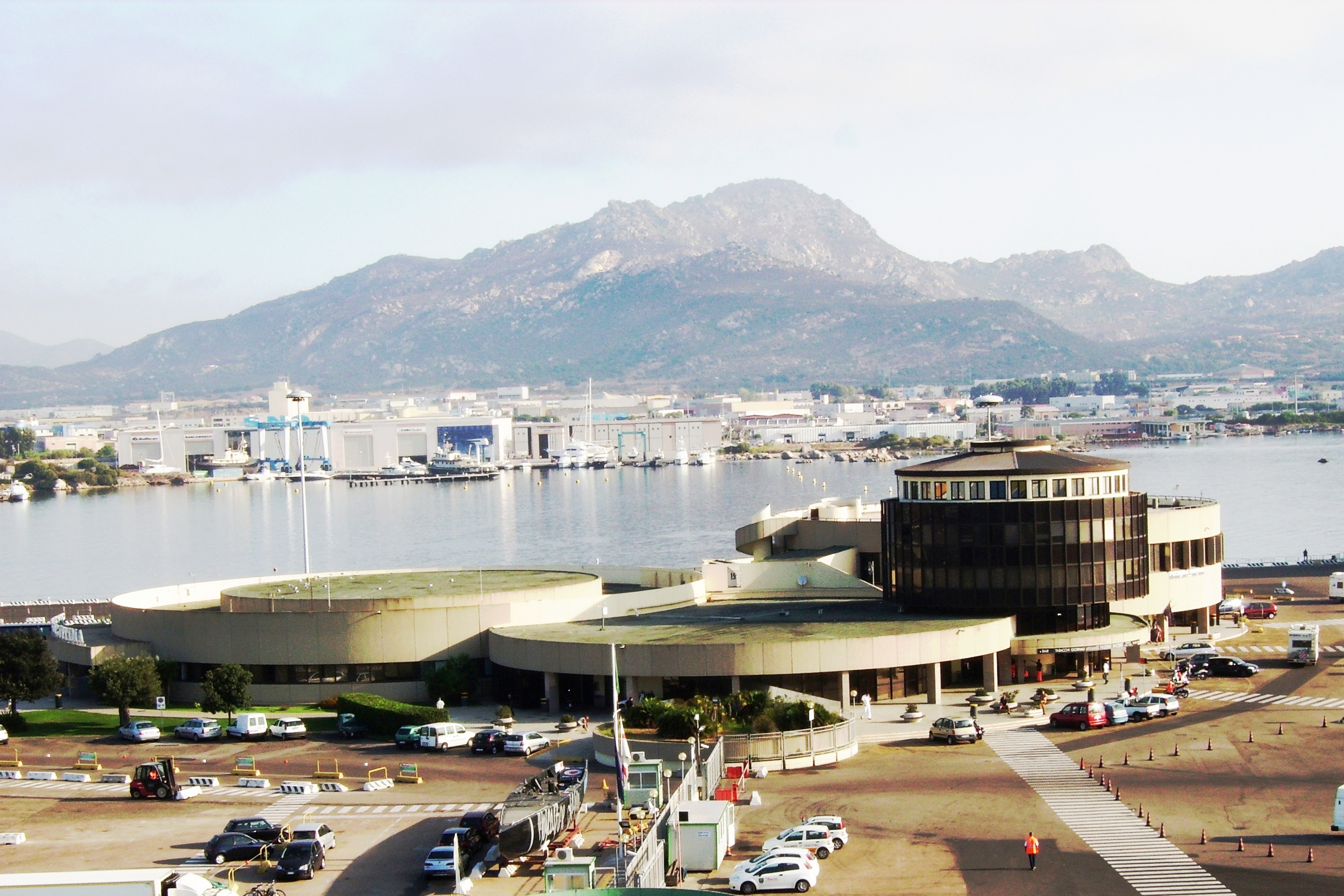 Olbia (Sardegna). Stazione marittima nel porto dell'Isola Bianca.